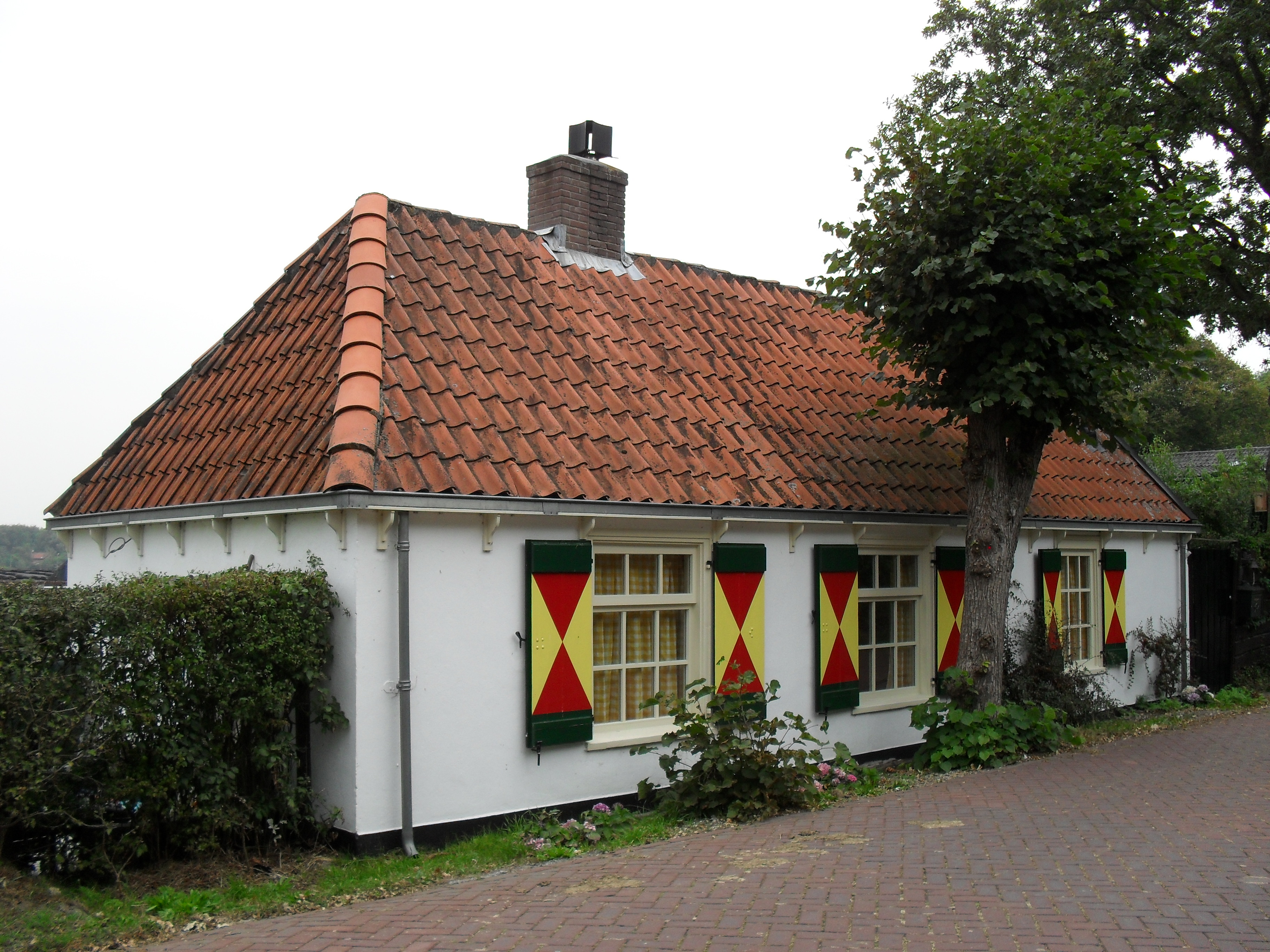 Middenduinerweg 85 te Santpoort Zuid.